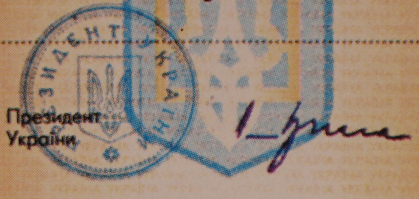 Leonid Kuchma signature. Орденская книжка «За заслуги». 1999. Подпись президента Украины Л. Кучмы (не факсимиле). "Мокрая" печать президента Украины.